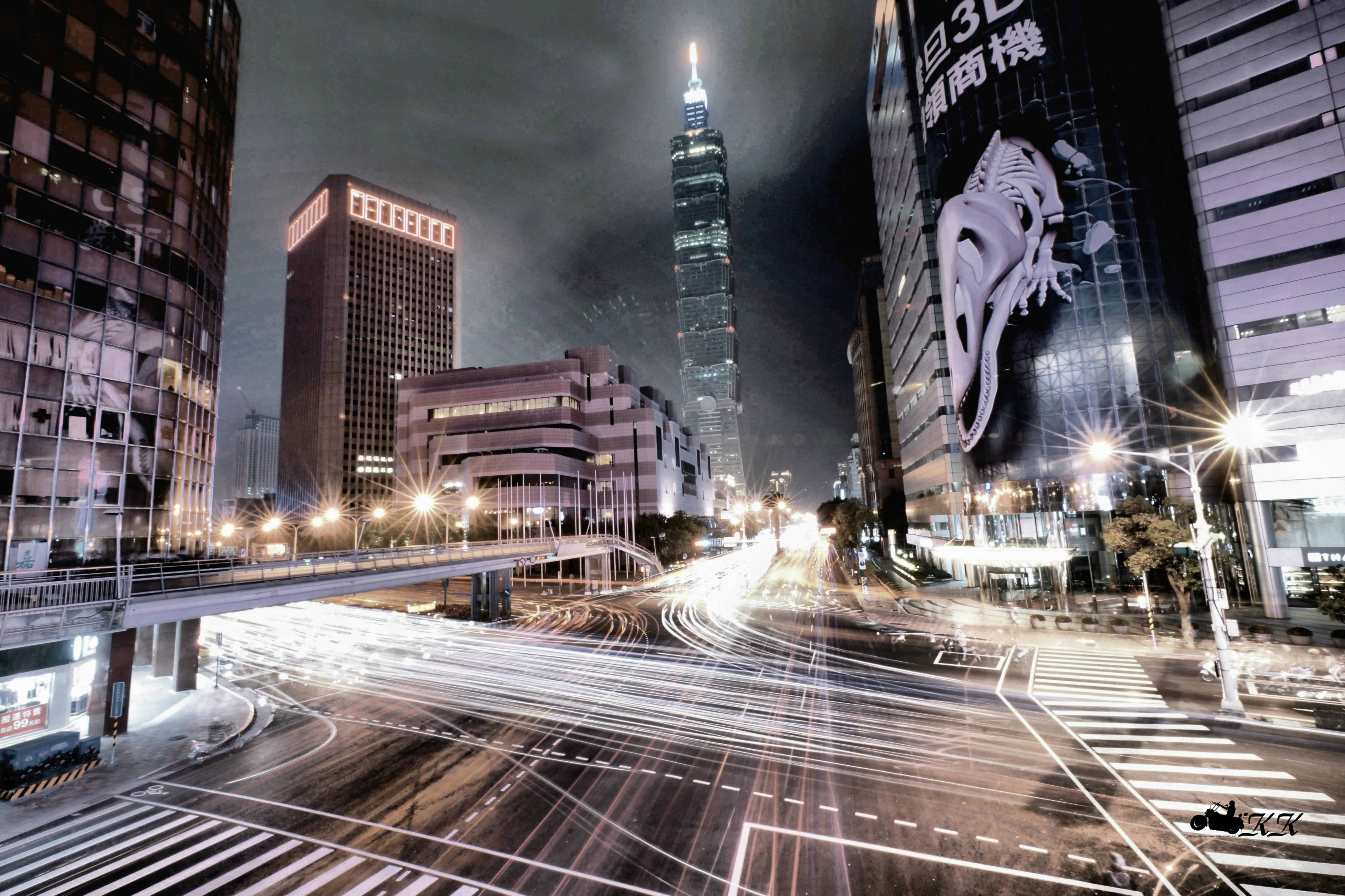 中文（台灣）: 臺北市信義區基隆路與信義路口夜景，中央三棟大樓左起：台北世界貿易中心國際貿易大樓、台北國際會議中心、台北101大樓。